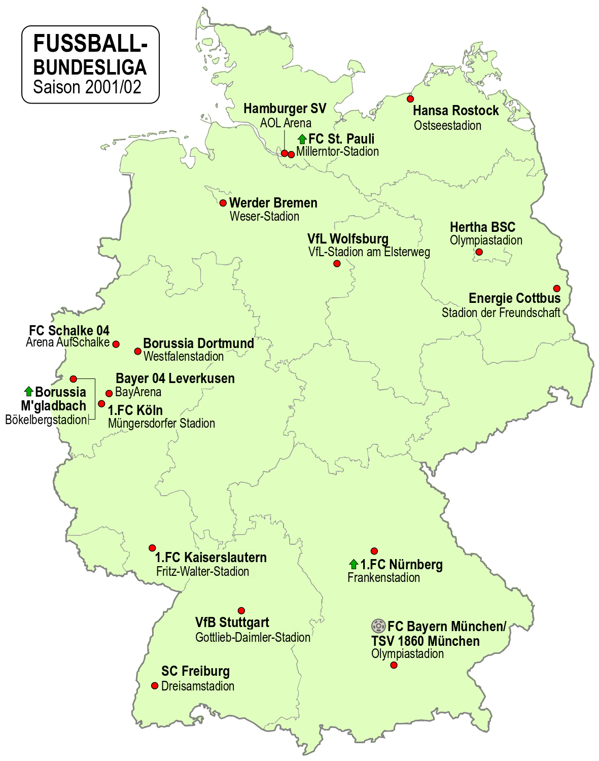 Karte der Vereine der Fussball-Bundesliga-Saison 2001/02